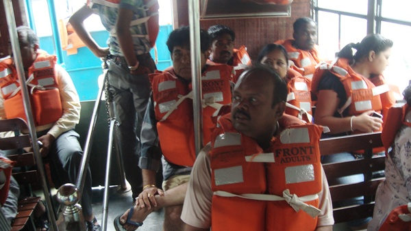 தேக்கடி படகுப் பயணப் பாதுகாப்பு உடை